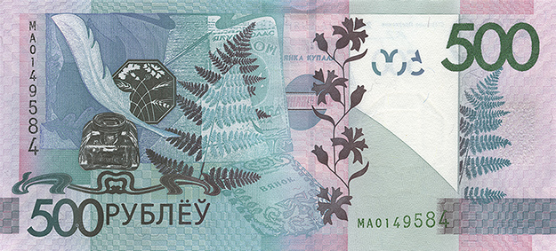 500 белорусских рублей образца 2009 года (оборотная сторона)